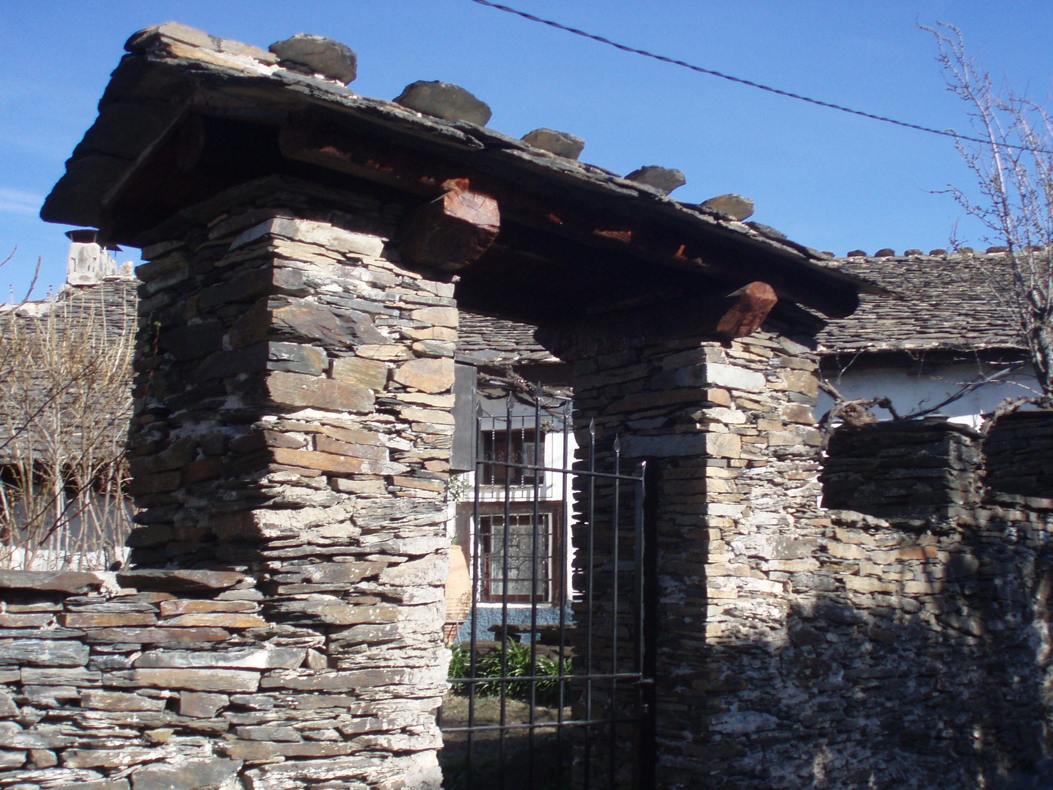 Pórtico representativo de la arquitectura negra en Majaelrayo (Segovia), España.